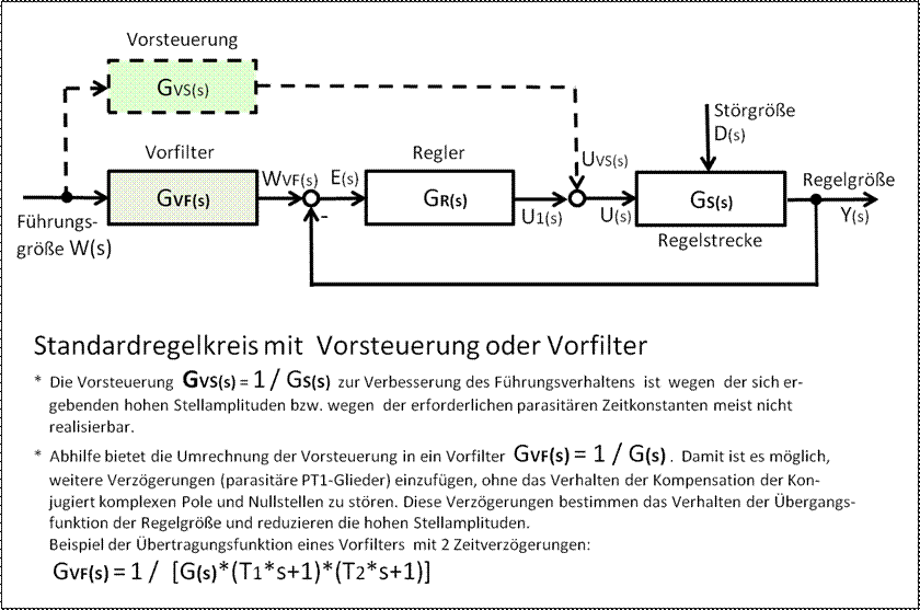 Blockschaltbild eines Regelkreises mit Vorsteuerung oder Vorfilter